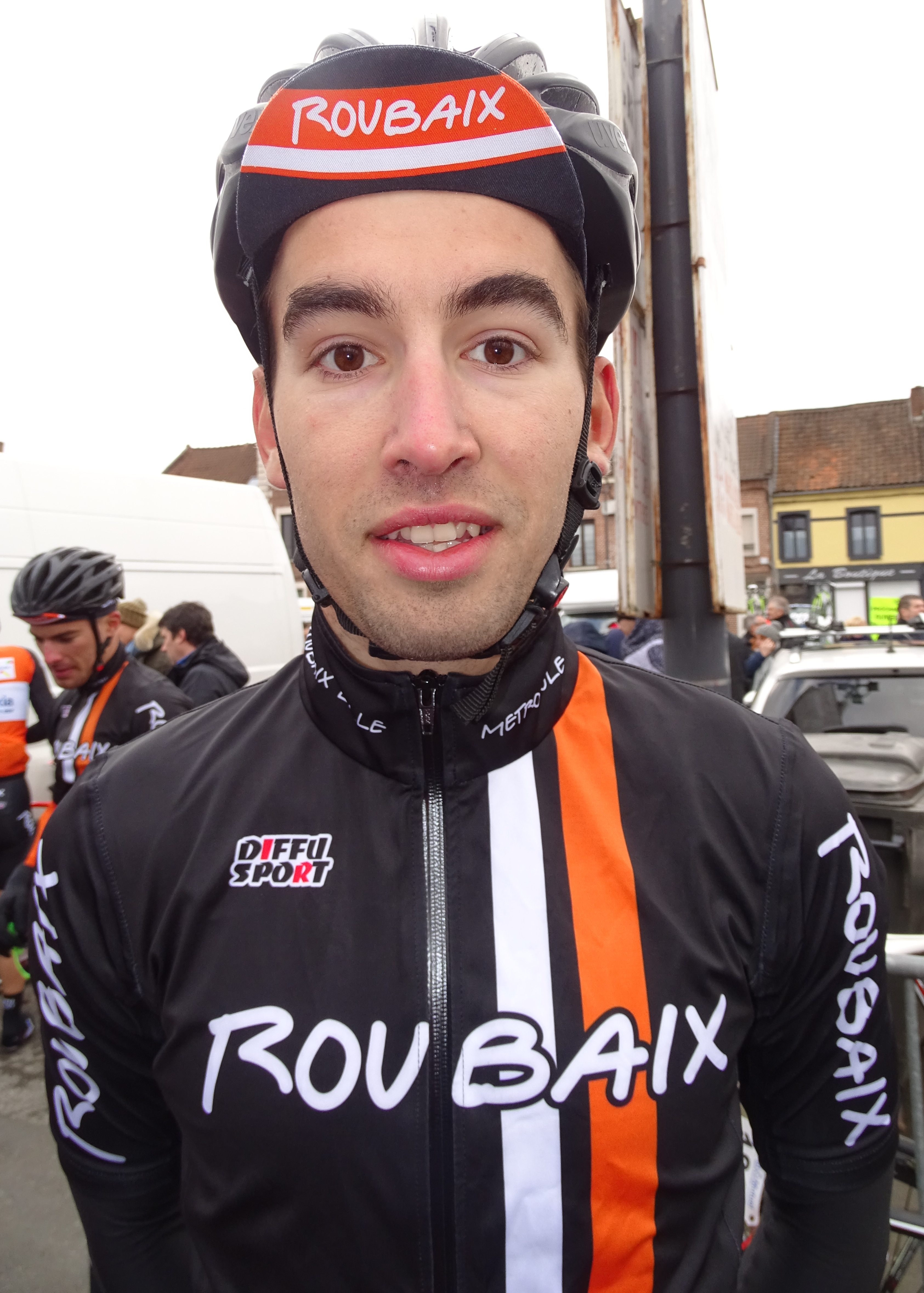 Reportage réalisé le dimanche 6 mars à l'occasion du départ et de l'arrivée du Grand Prix de Lillers-Souvenir Bruno Comini 2016 à Lillers, Pas-de-Calais, Nord-Pas-de-Calais, France.